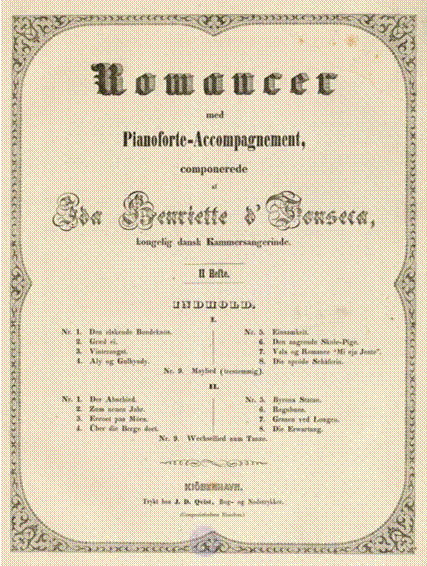 Forsiden til et nodehæfte fra 1853 med romancer af Ida Henriette da Fonseca